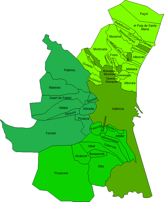 La comarca natural de l'Horta amb les diferents parts que la formen actualment destacades i els noms dels municipis que s'hi troben. He canviat la imatge de la comarca amb la que hi havia anteriorment (de Servitje) destacant les comarques actuals que la formen i hi he afegit el nom de cada terme municipal.